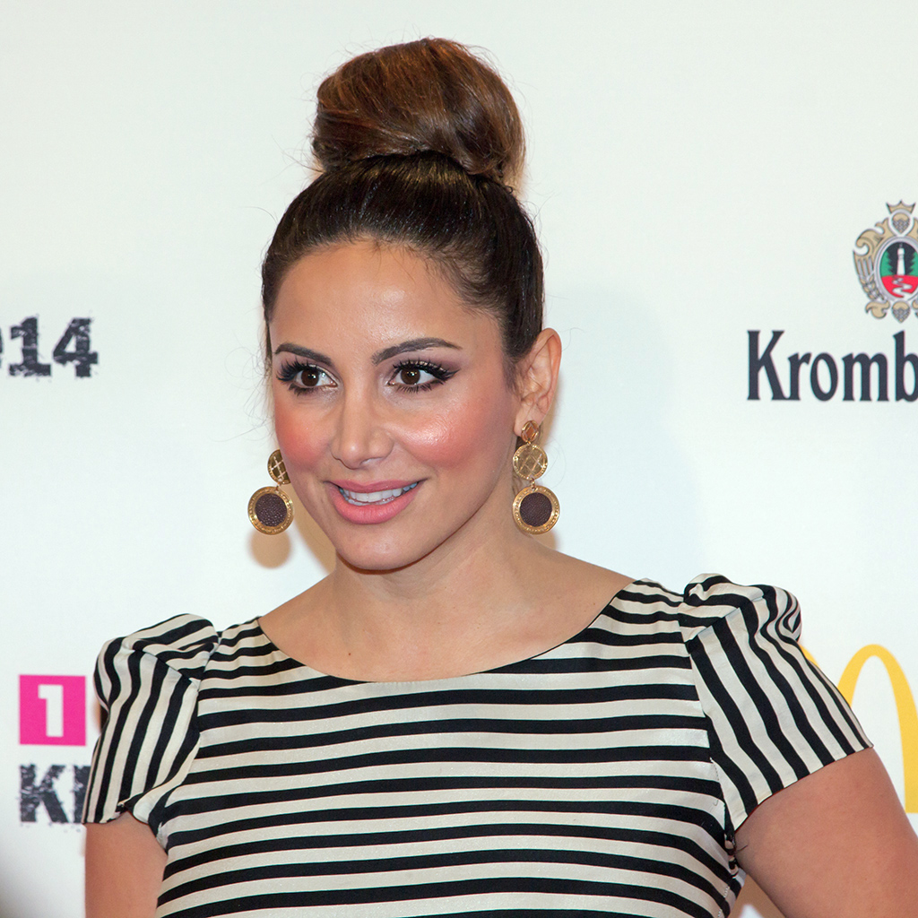 1LIVE Krone 2014 in der Bochumer Jahrhunderthalle: Enissa Amani auf dem roten Teppich